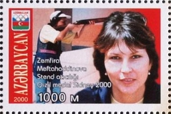 Zemfira Meftəhəddinova